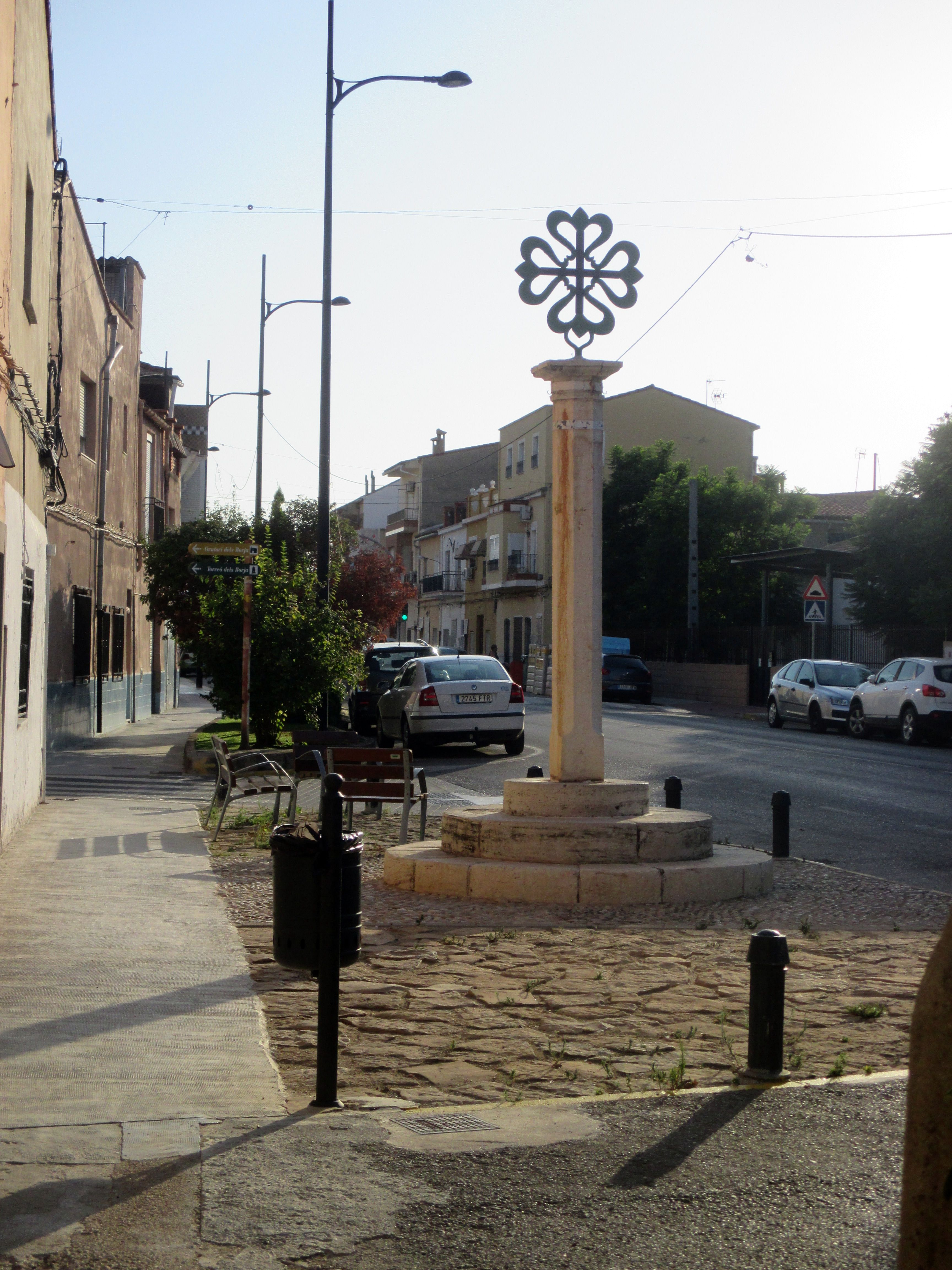 Creu de la Torre de Canals i voltants (carrer Torreta). Construïda el 1891.